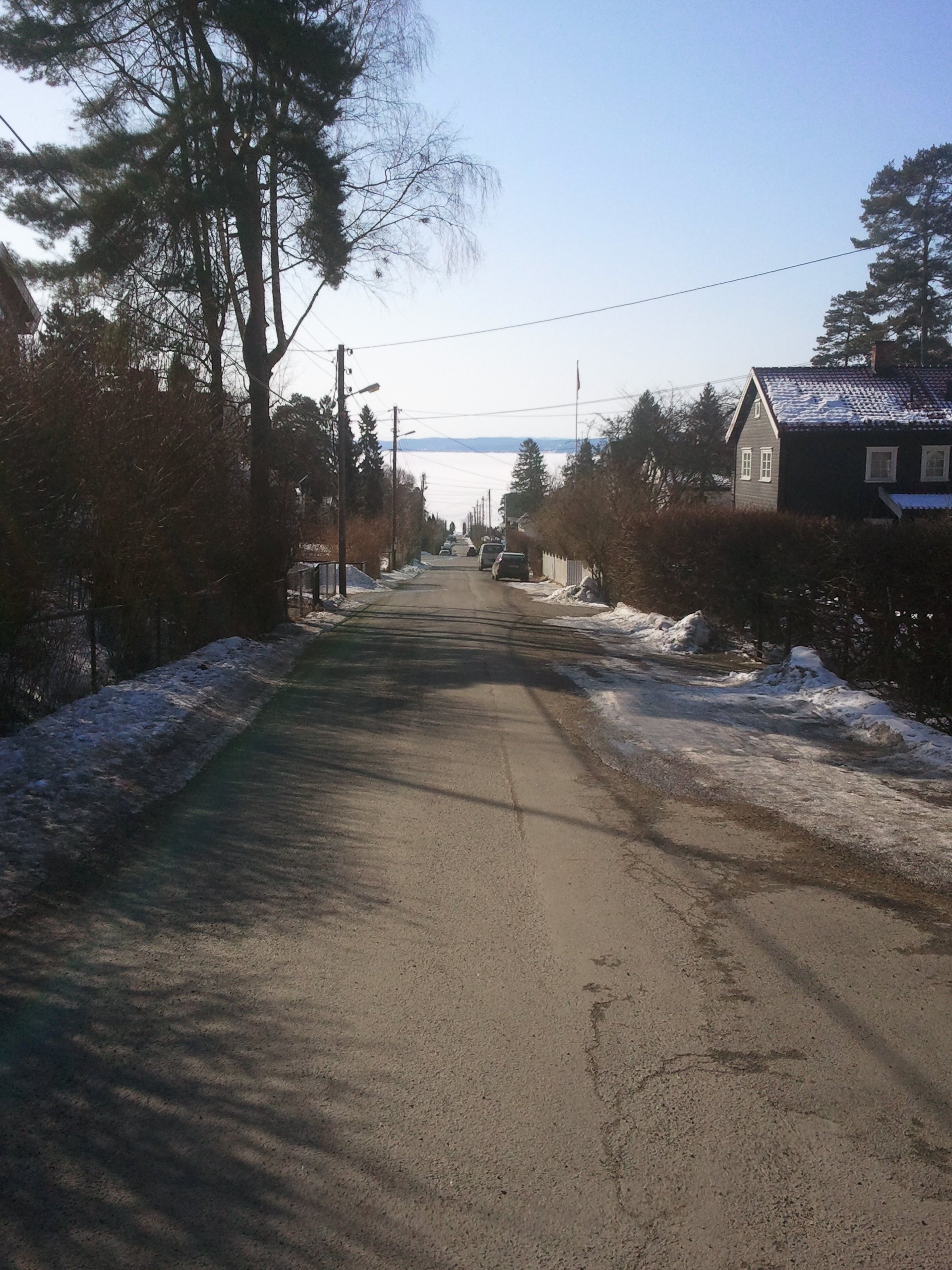 Fjordveien på Ulvøya, sett mot sør